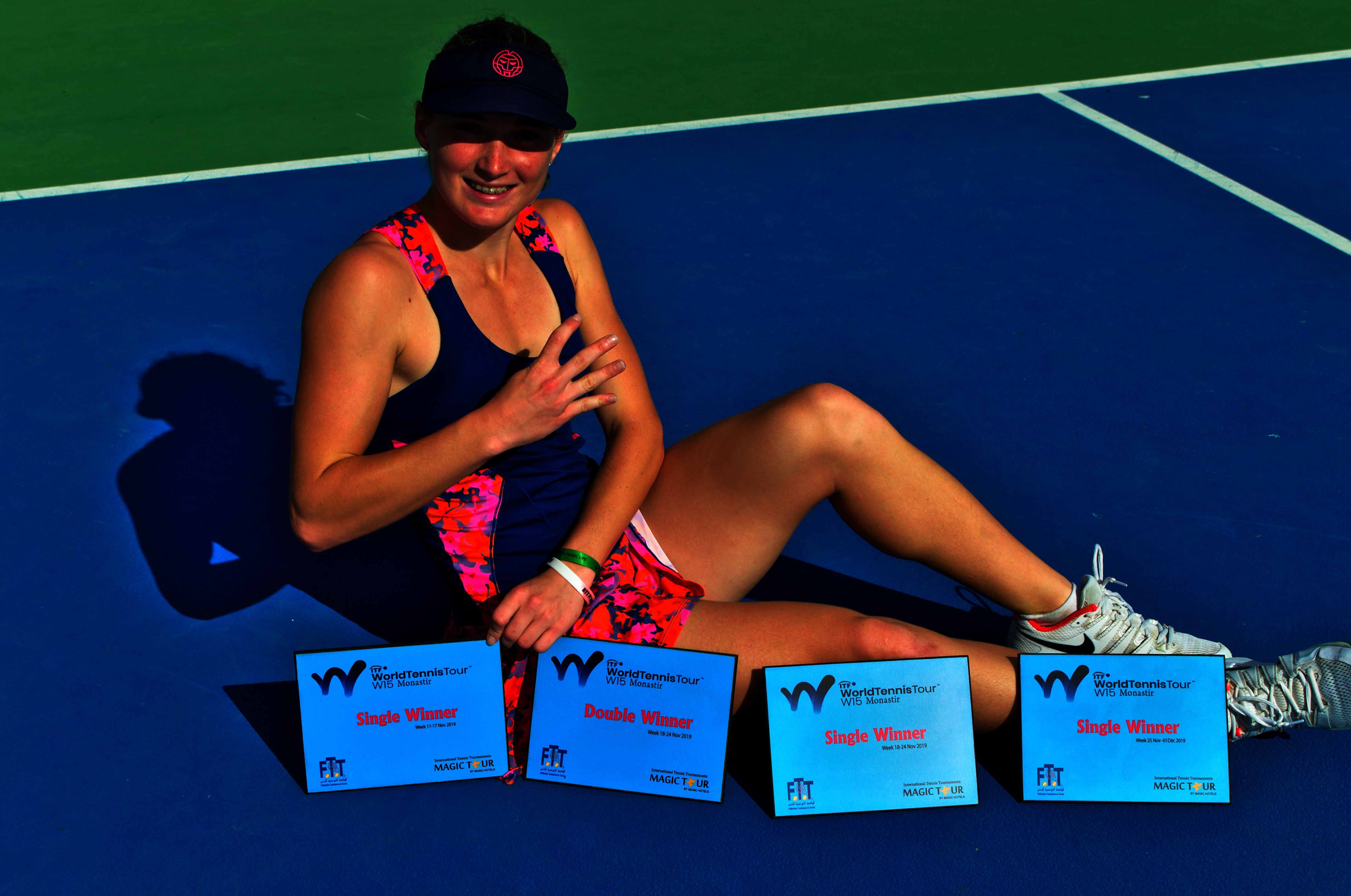 4 titres consécutifs à Monastir